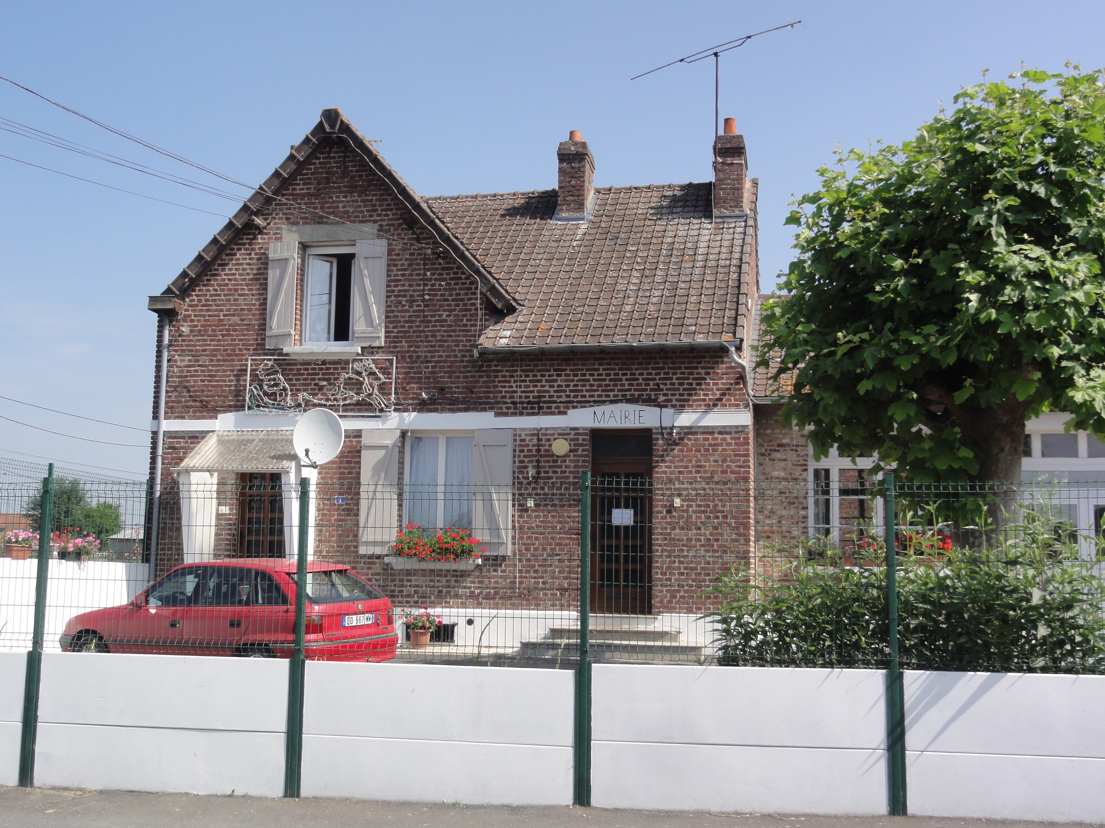 Magny-la-Fosse (Aisne) mairie